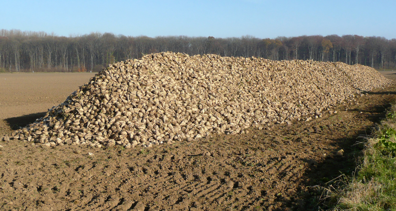 Zuckerrübenmiete_im_Calenberger_Land